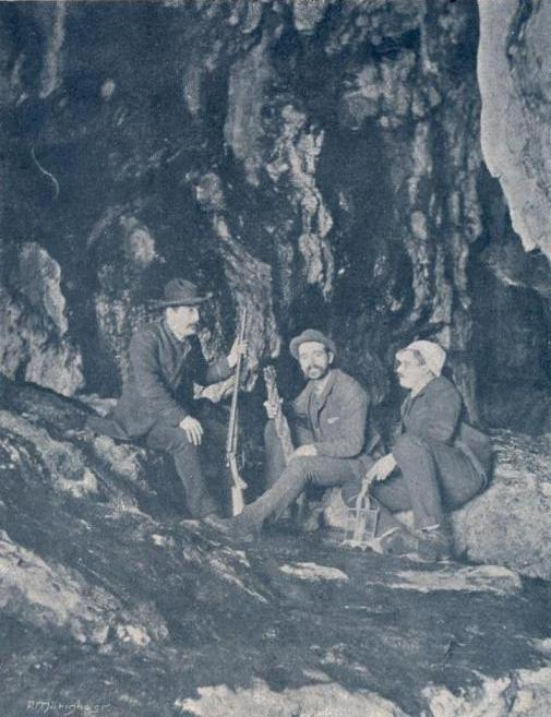 "Ilhéu do Romeiro - Gruta de stalactites e stalagmites", in Álbum Açoriano, fascículo nº 38, 1903, p. 298.